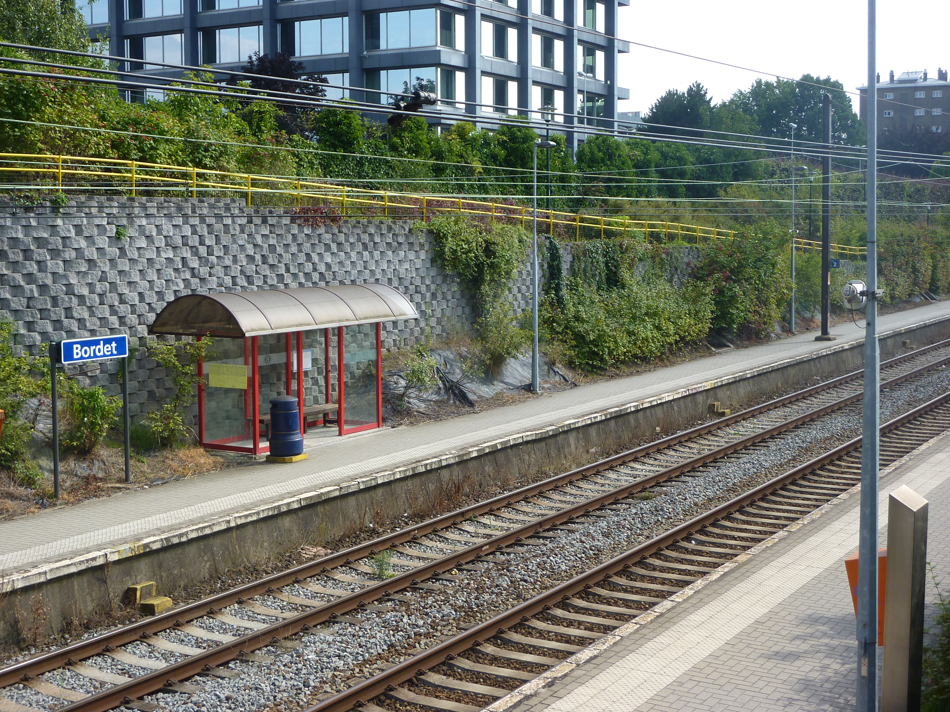 Gare de Bordet, Bruxelles, Belgique.